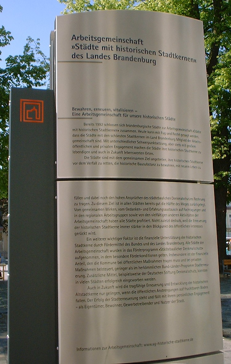 Informationstafel der Arbeitsgemeinschaft „Städte mit historischen Stadtkernen“ vor dem Alten Gymnasium in Neuruppin in Brandenburg, Deutschland